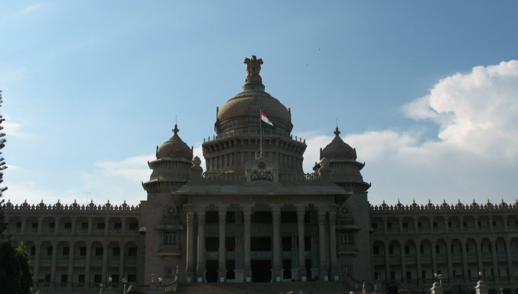 Another View of Vidhan saudha